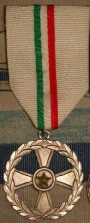 croce commemorativa per operazioni militari